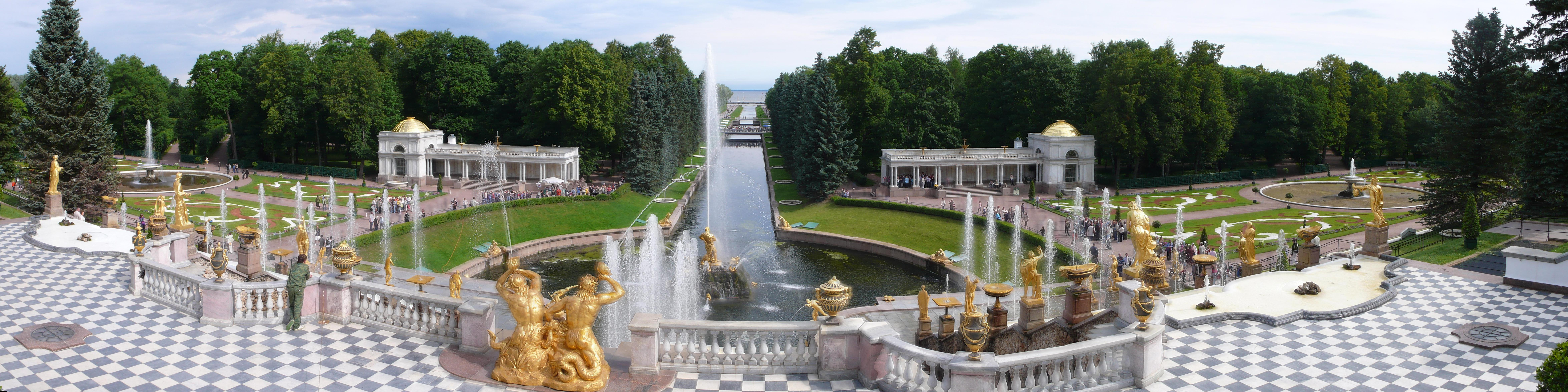 Peterhof, nachbearbeitet